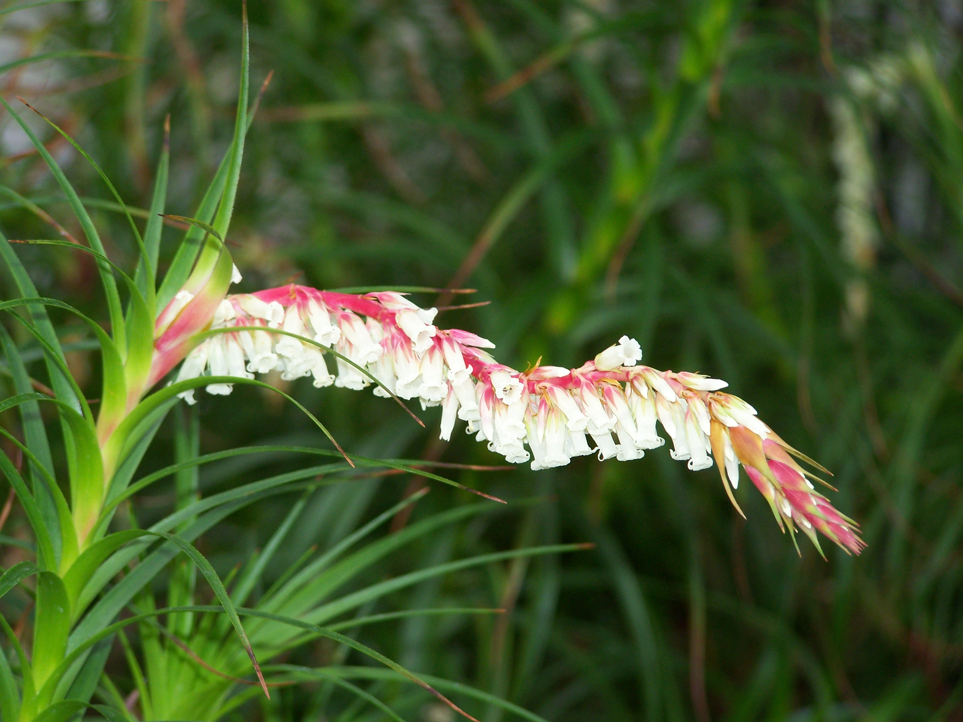 Dracophyllum secundum, Einseitswendiges Drachenbaumblatt, Subfamilia Styphelioideae, SO-Australien, Botanischer Garten Berlin